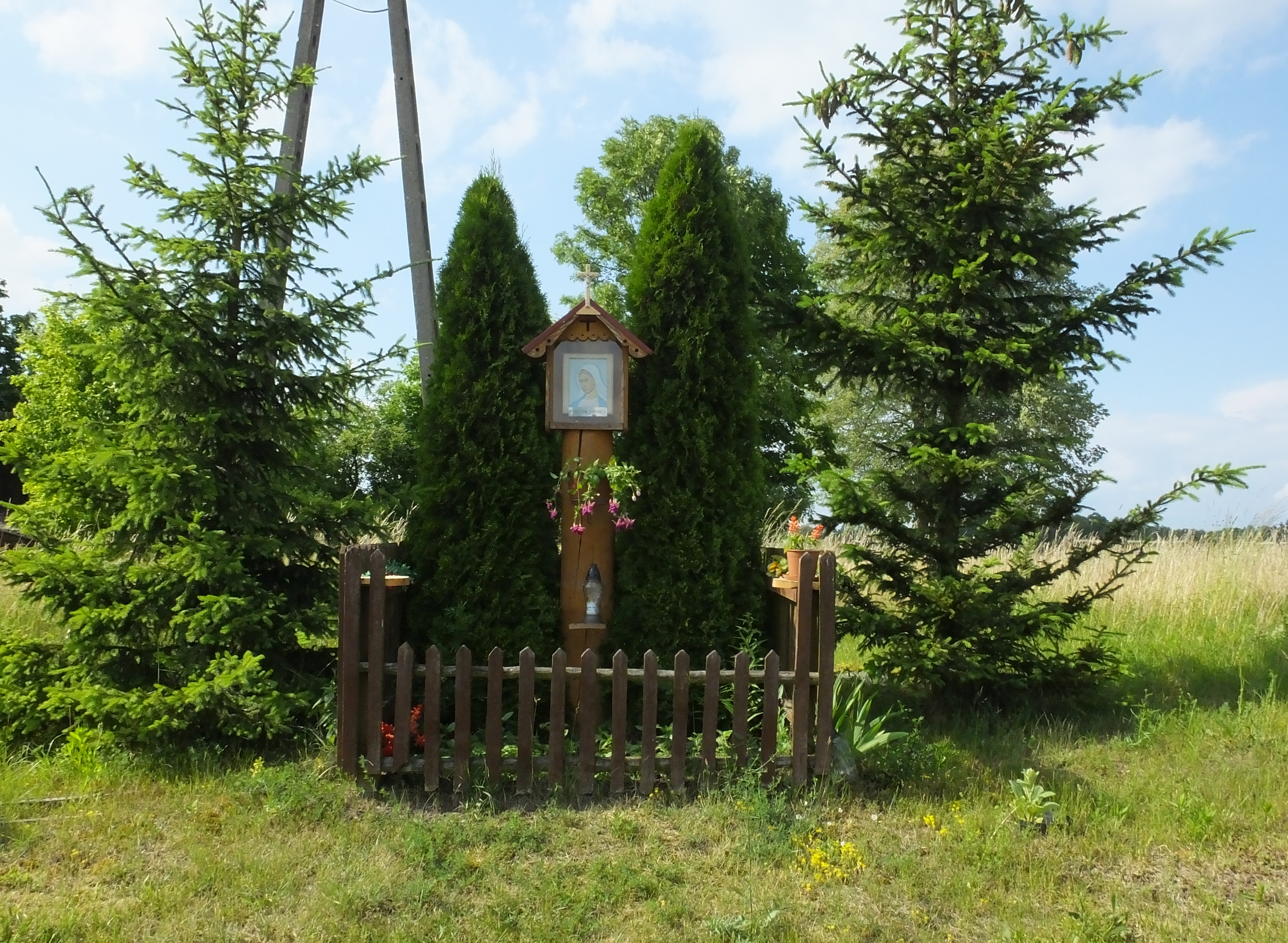 Nowy Most, część wsi Bobrówko k. Mikołajek